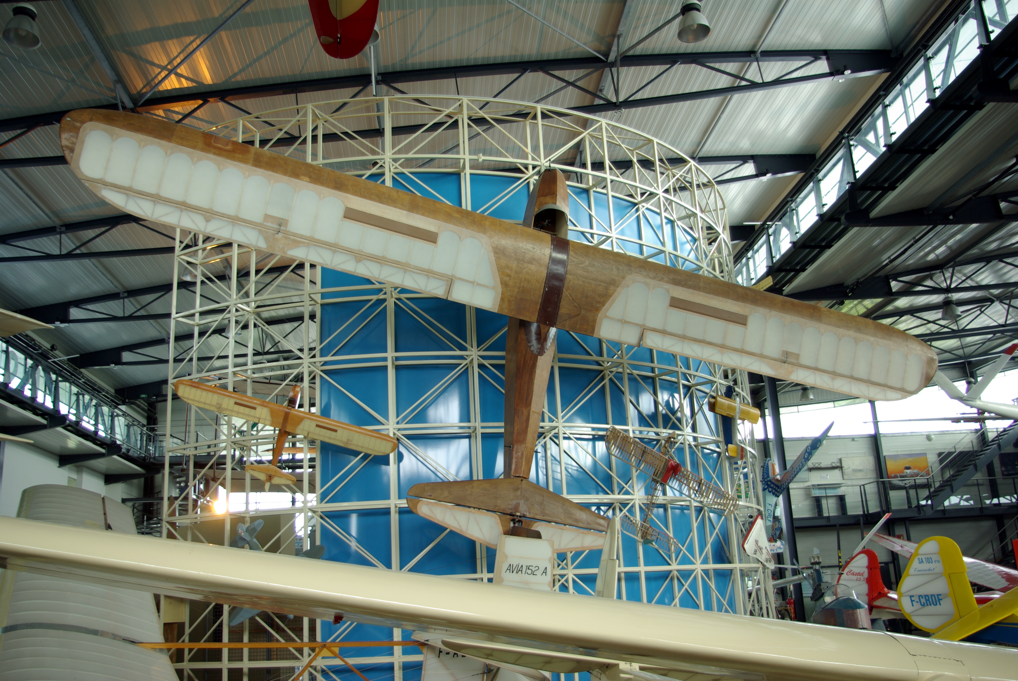 Castel 301S Ailette présenté à l'Espace Air Passion à Angers.